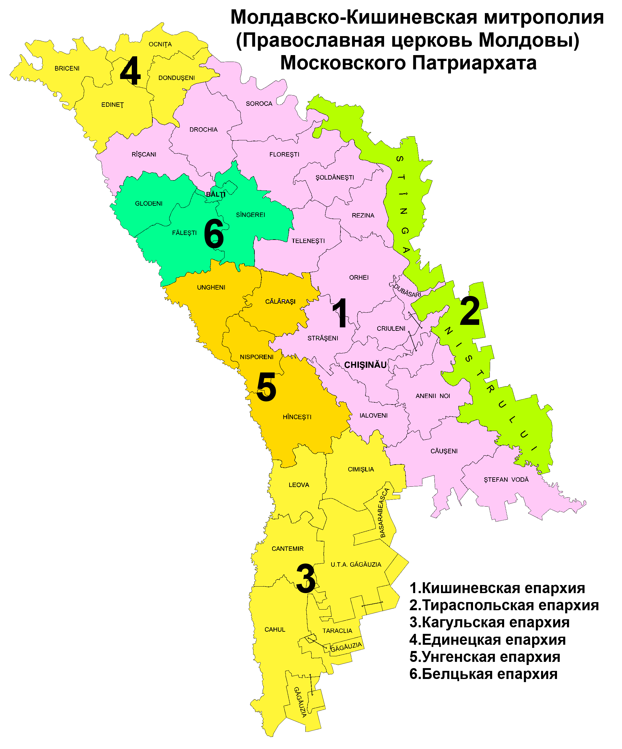 Православная церковь Молдовы (Московский патриархат)